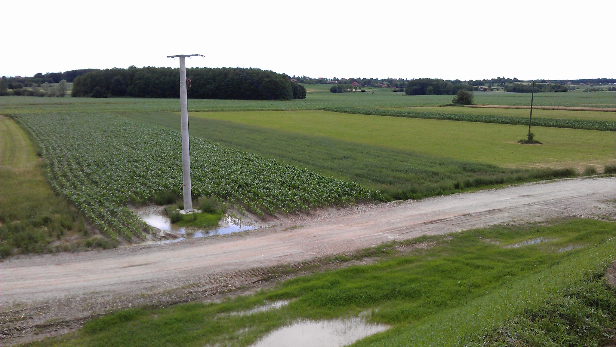 polja